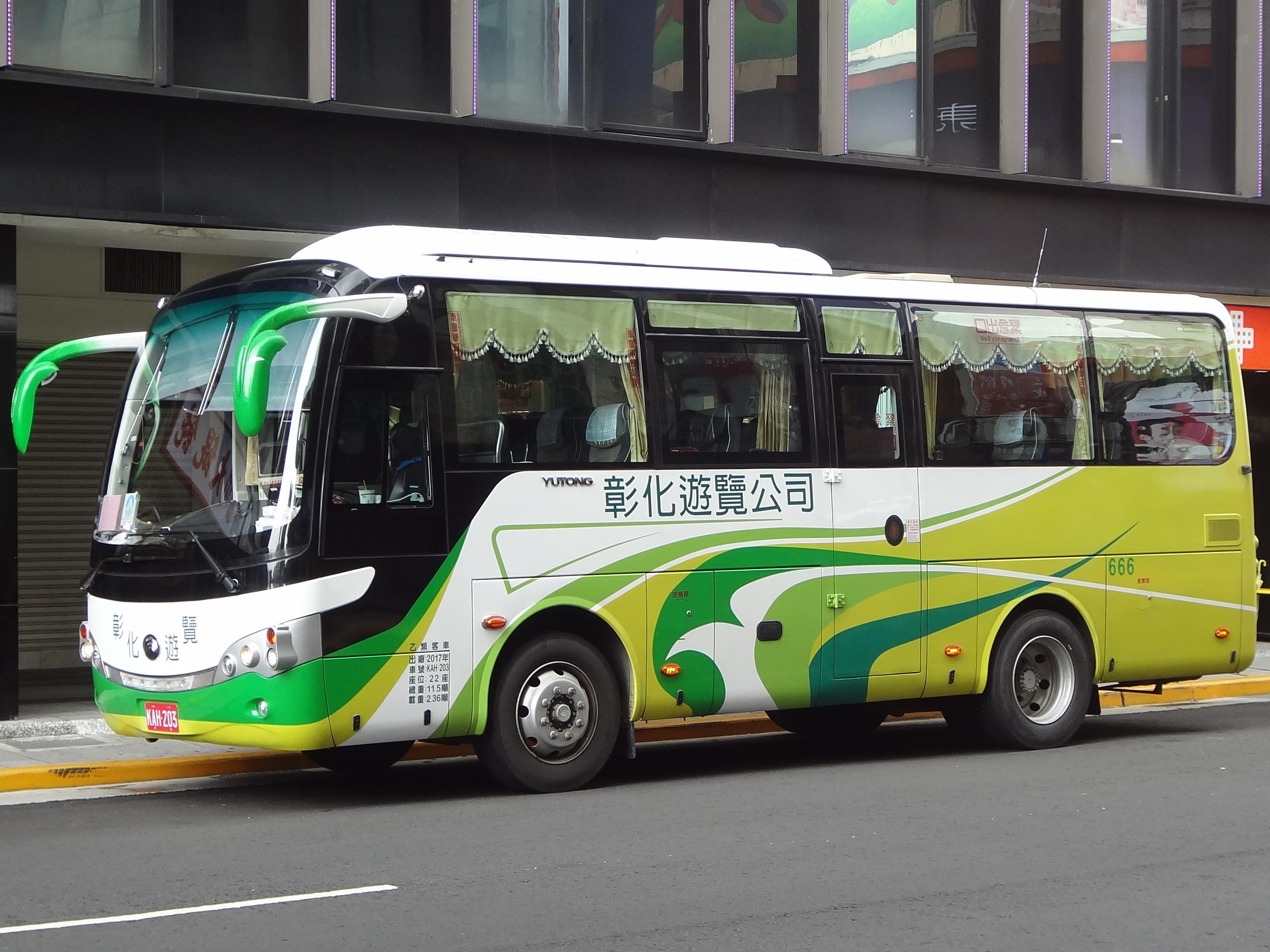 臺北市中正區衡陽路，彰化遊覽公司2017年台灣宇通ZK6858H遊覽車KAH-203。